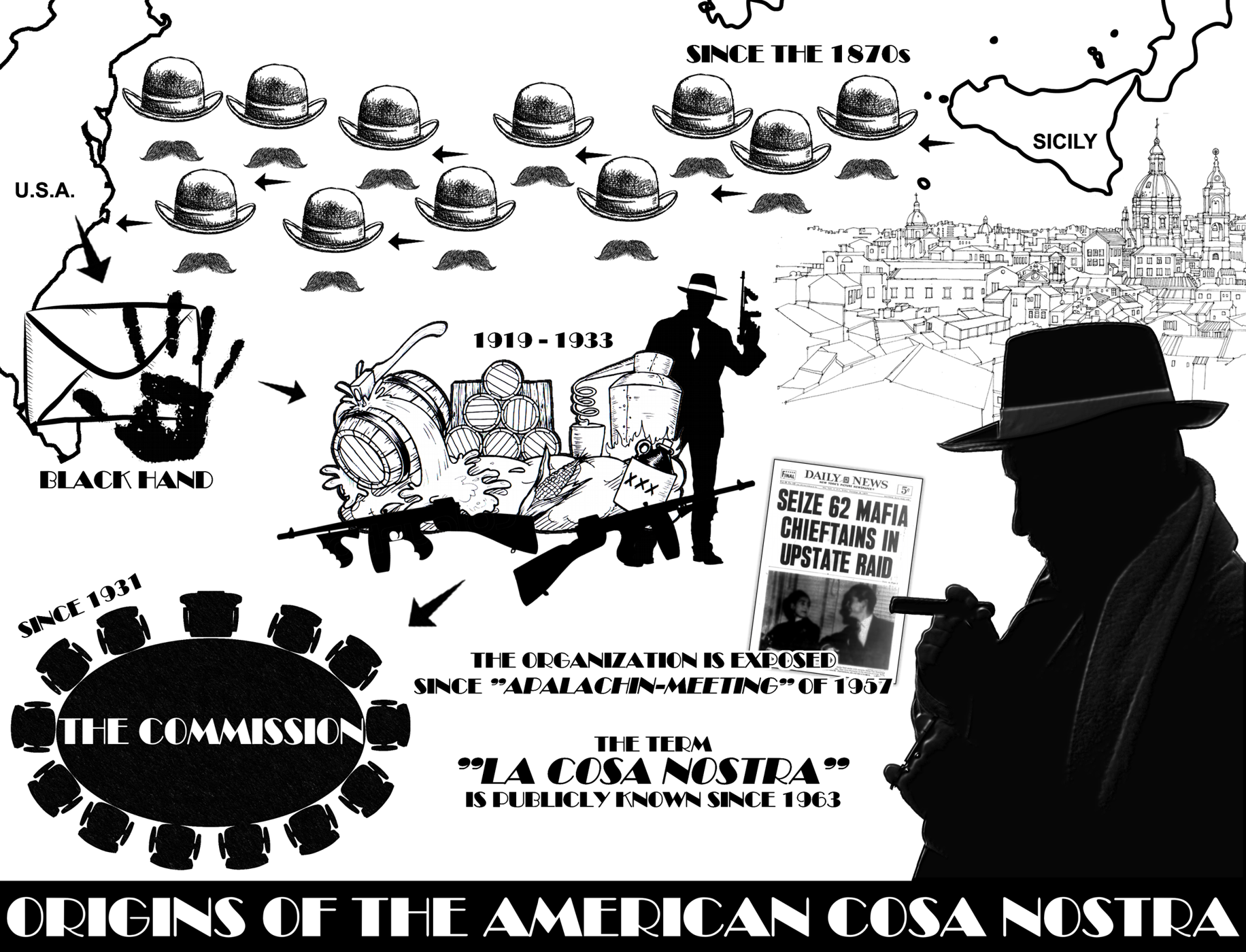 Origins of the American Cosa Nostra